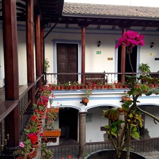 Interior del patio del Museo Casa de Antonio José de Sucre